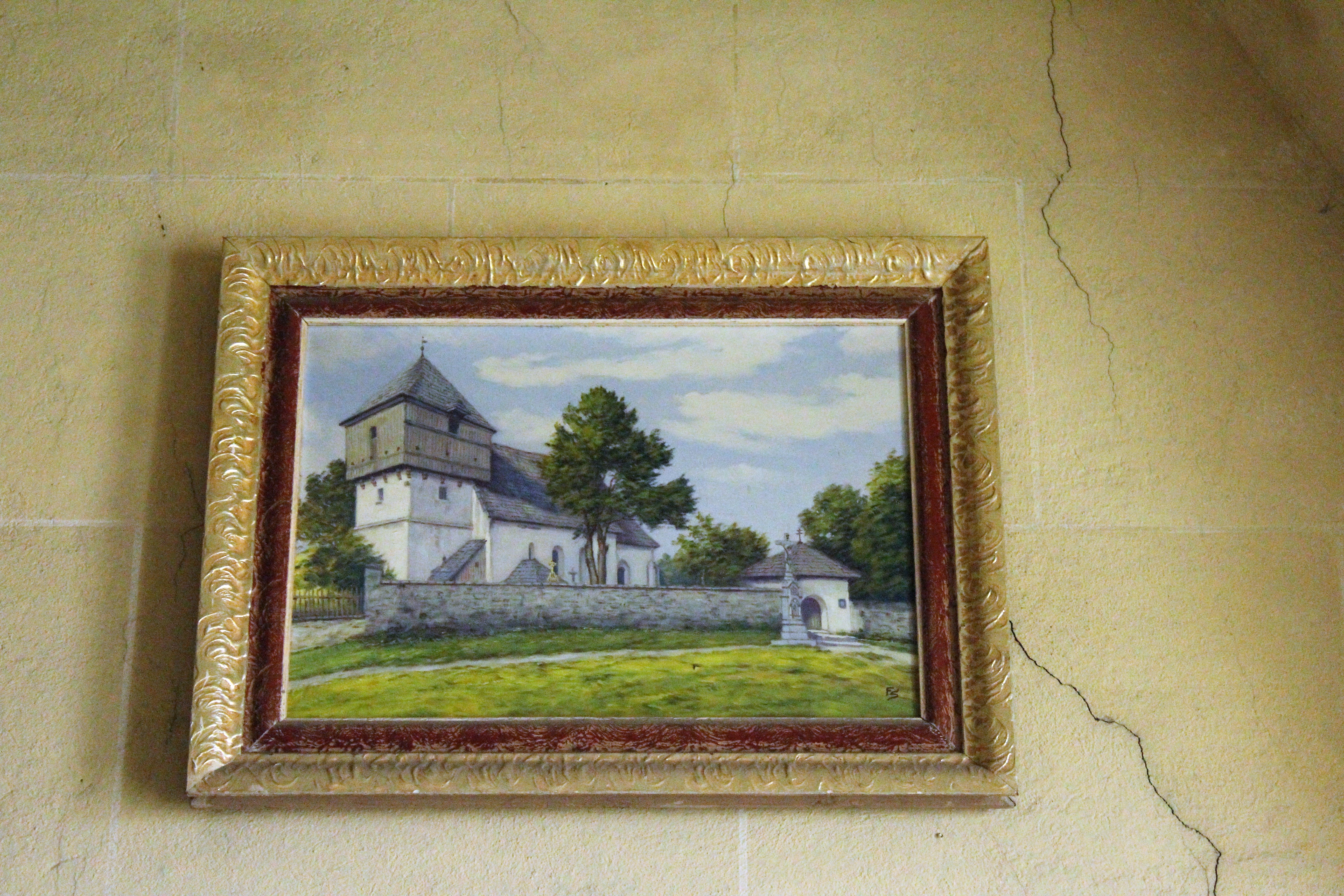 obraz původního kostela nacházející se přímo v kostele